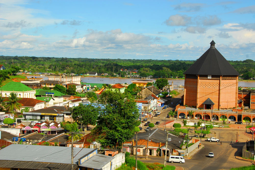 Centro de Cruzeiro do Sul-Acre